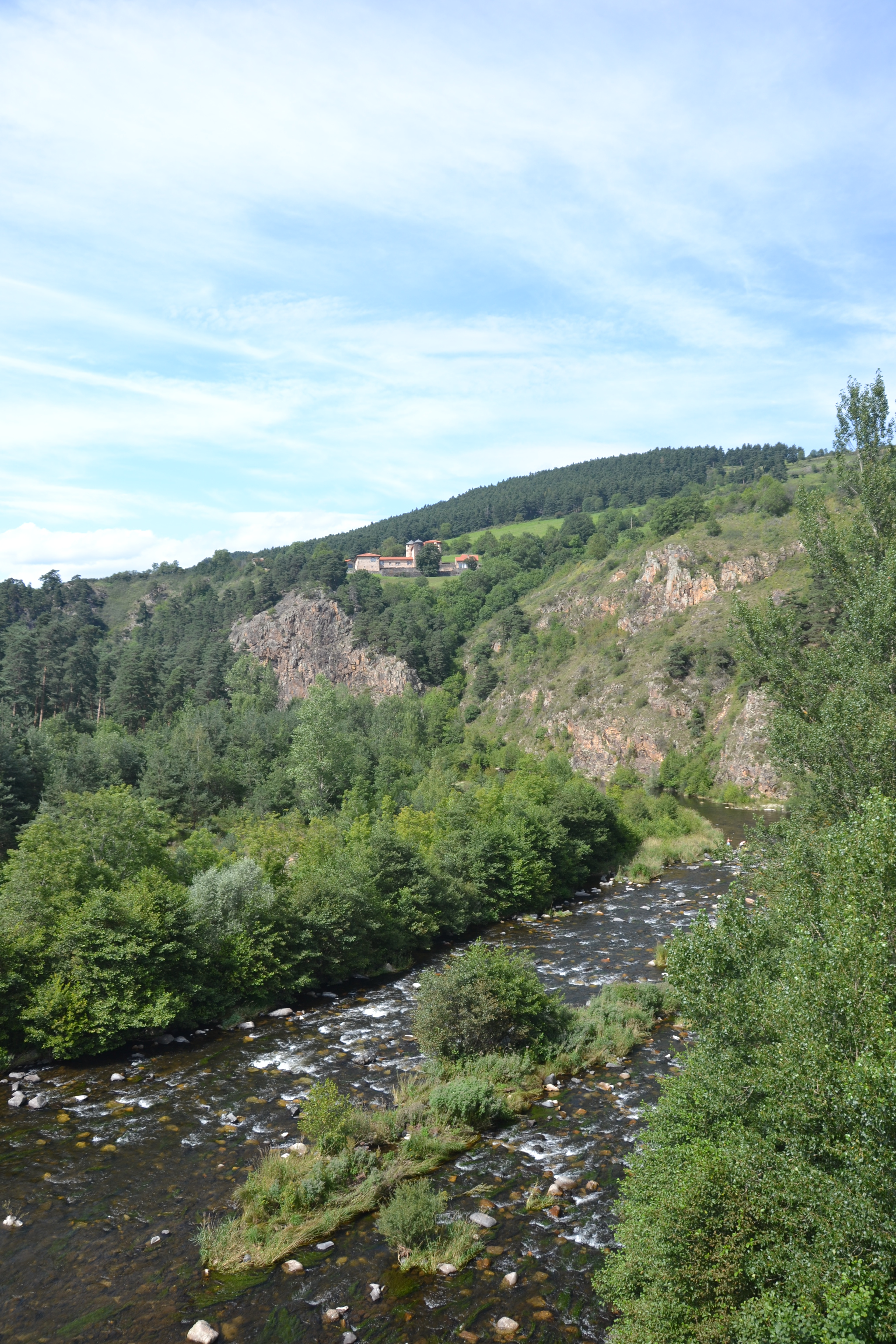 La Loire à Chadron, vue vers l'aval et La Valette